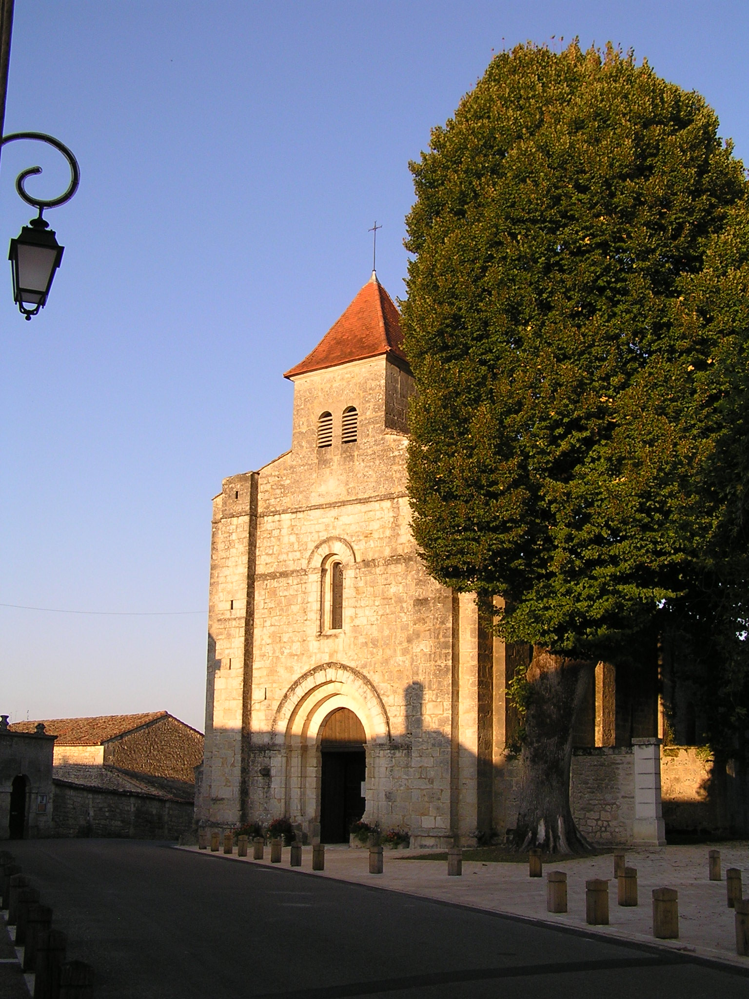 église de Garat (Charente)